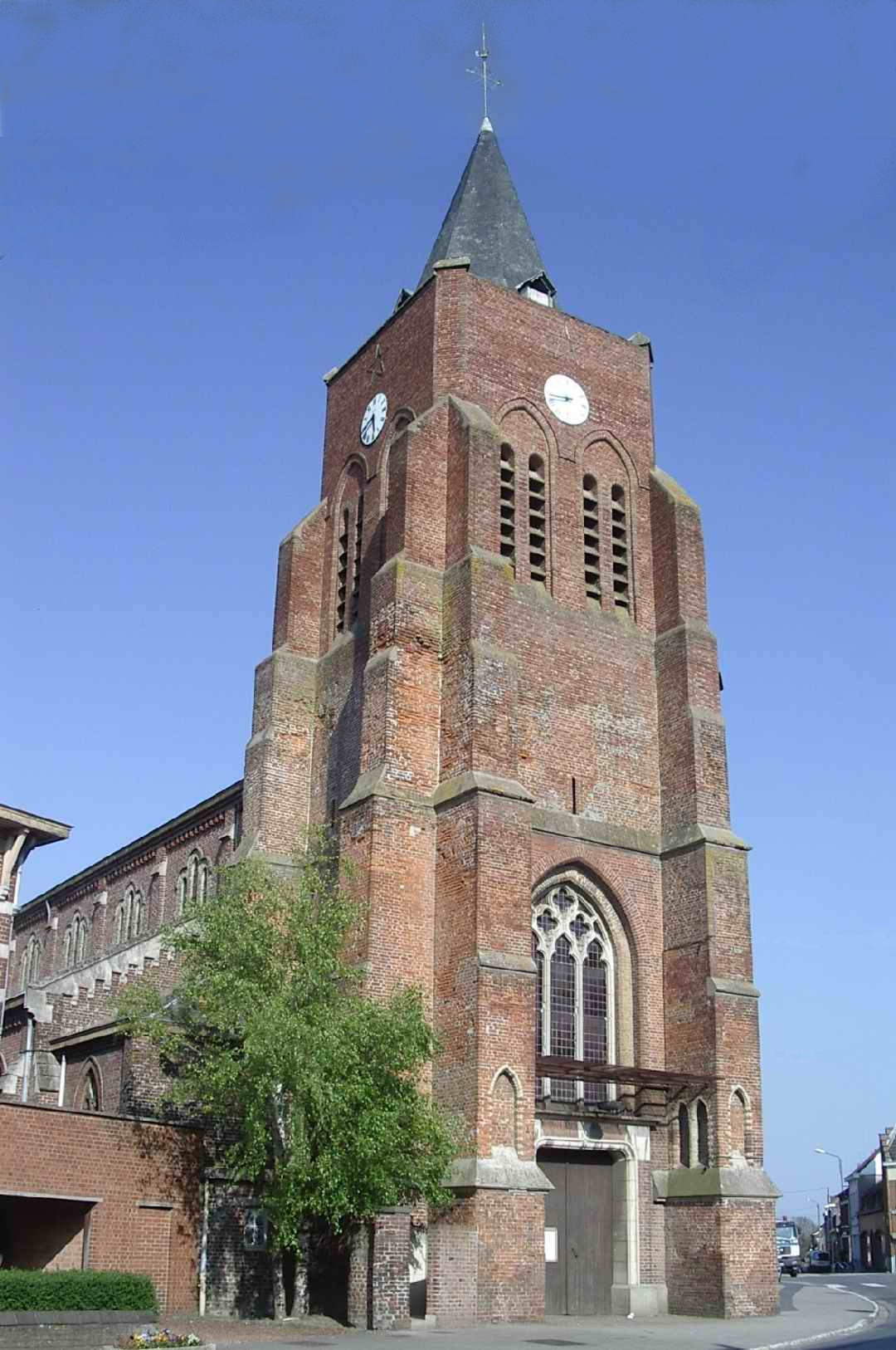 L’église St Omer de Caëstre (Nord, France).